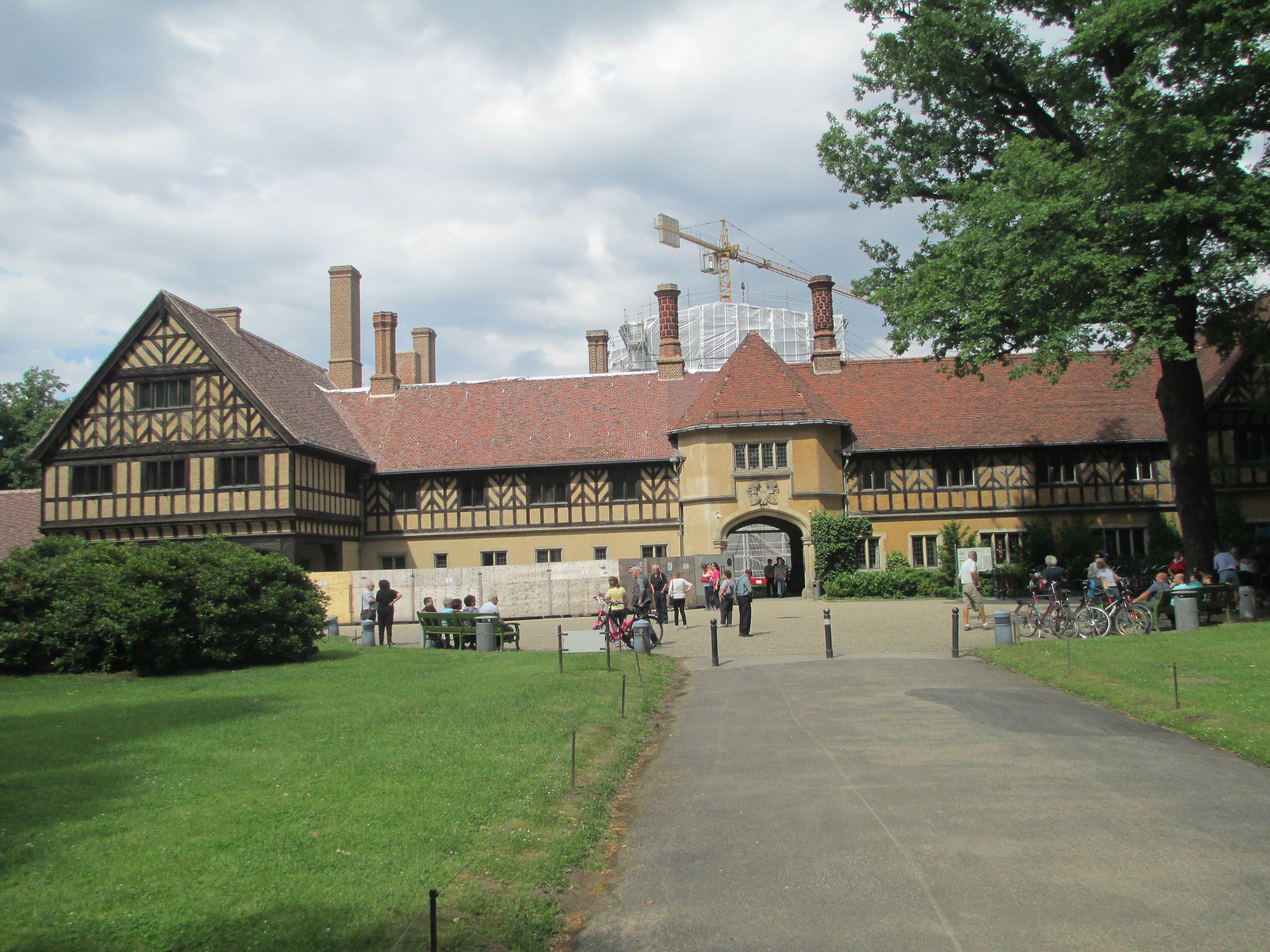 ארמון צציליינהוף